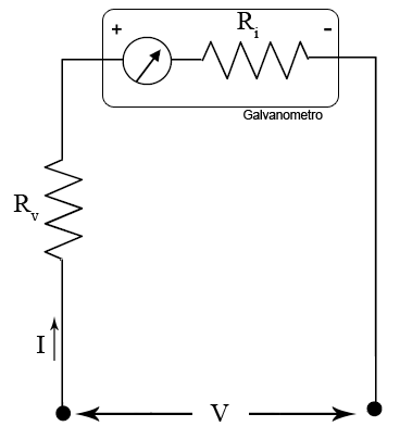 Circuito de un voltimetro